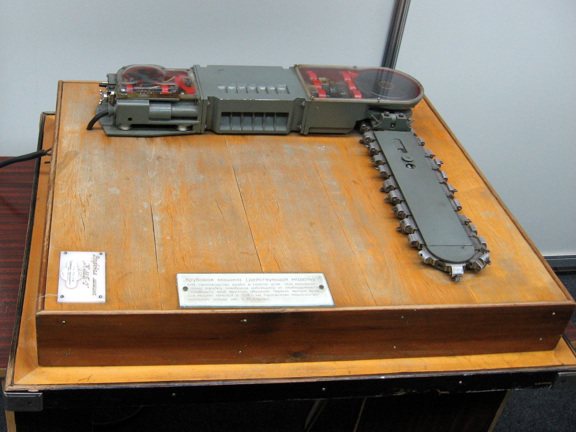 Фото з виставки Вугілля-Майнінг 2010